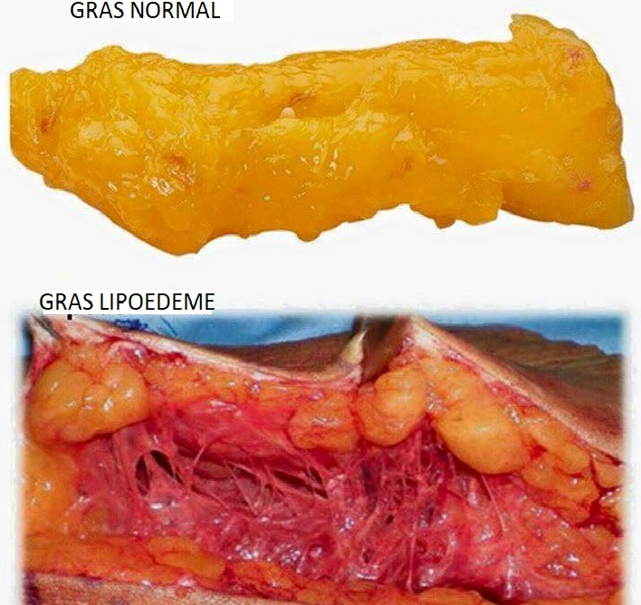 Différence entre 2 types de gras humain